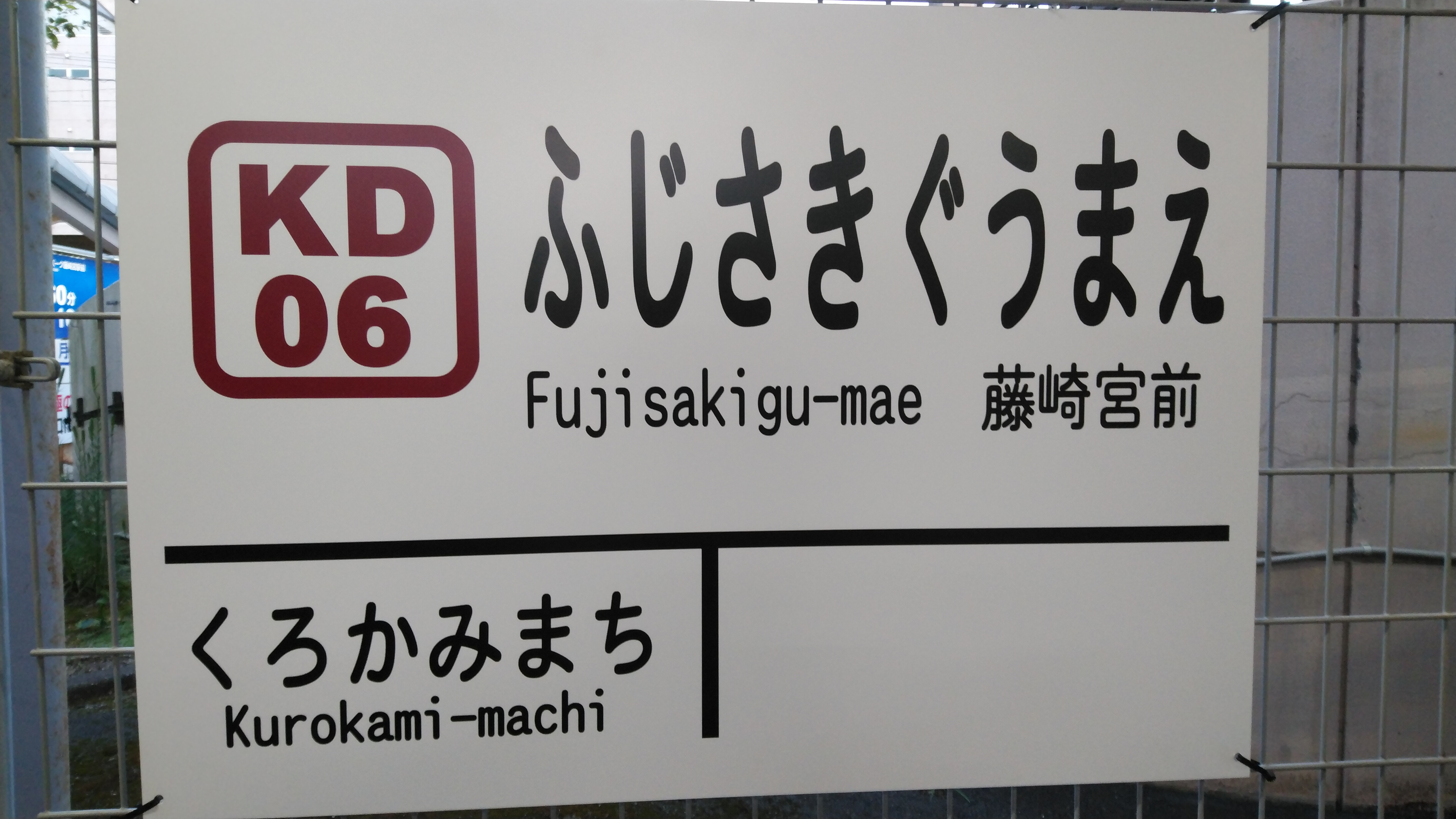 2019年10月に導入した駅ナンバリングが入った新駅名標